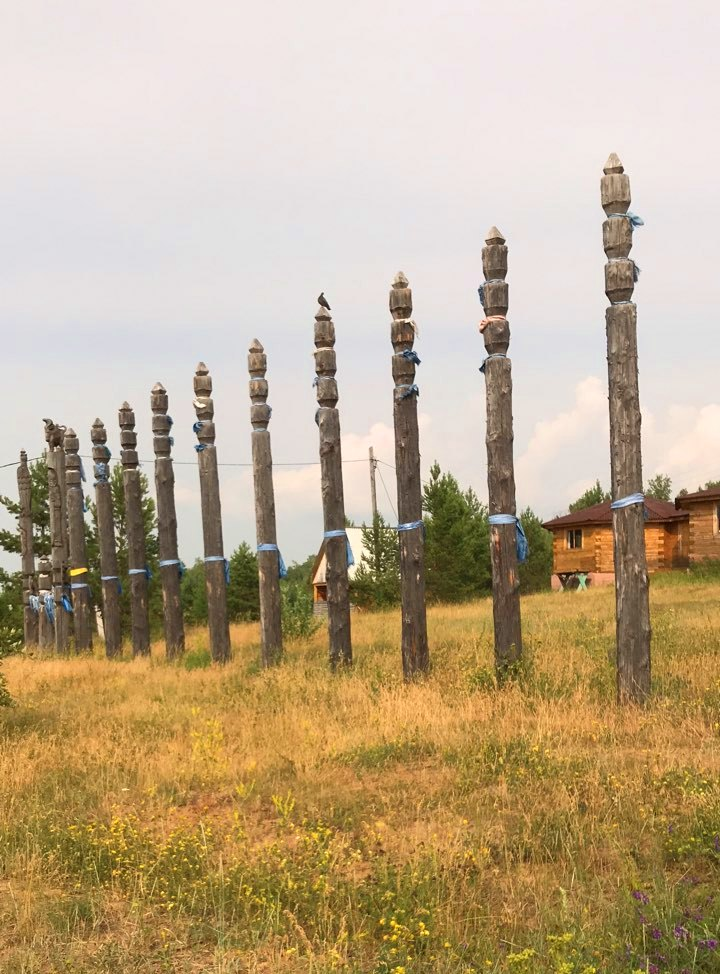 Buryat concierge. Buryatia, Russia